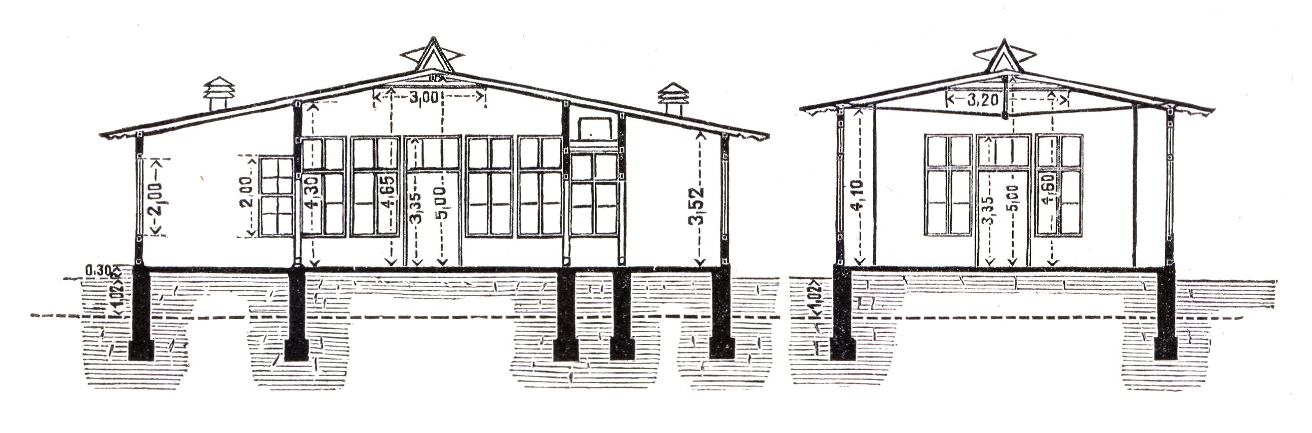 Berlin - Krankenhaus Moabit, Schnitte Baracke durch den Tagesraum und durch den Krankensaal